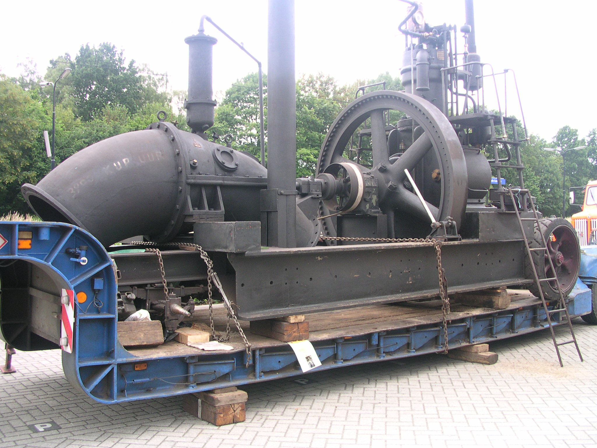 Kerkrade, Industrion, Maschinenfest 2004. Motor: Bronsmotoren Appingendam, Type verstuivingsbakje, Brandstof: Petroleum of diesel, Vermogen: 40 pk bij 180 tpm, Bouwjaar: 1912. Stork-pomp